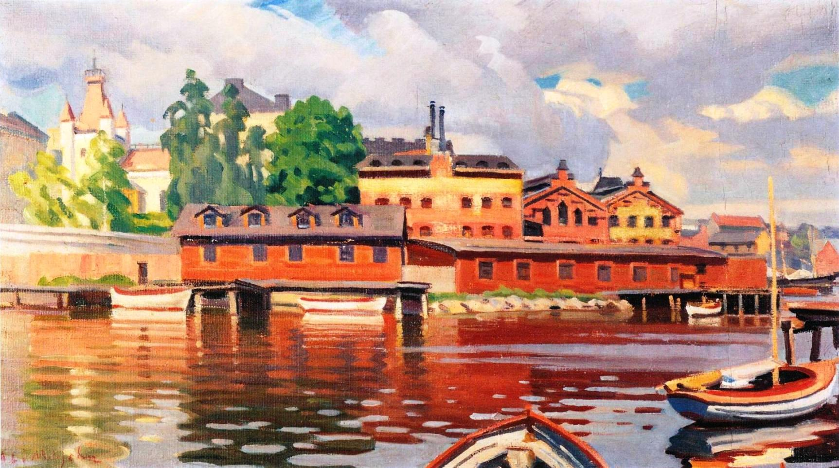 Ali Munsterhjelmin maalaus Helsingin Siltasaaresta Siltavuorenrannan puolelta nähtynä. Kuuluu Taidesäätiö Meritan kokoelmiin.